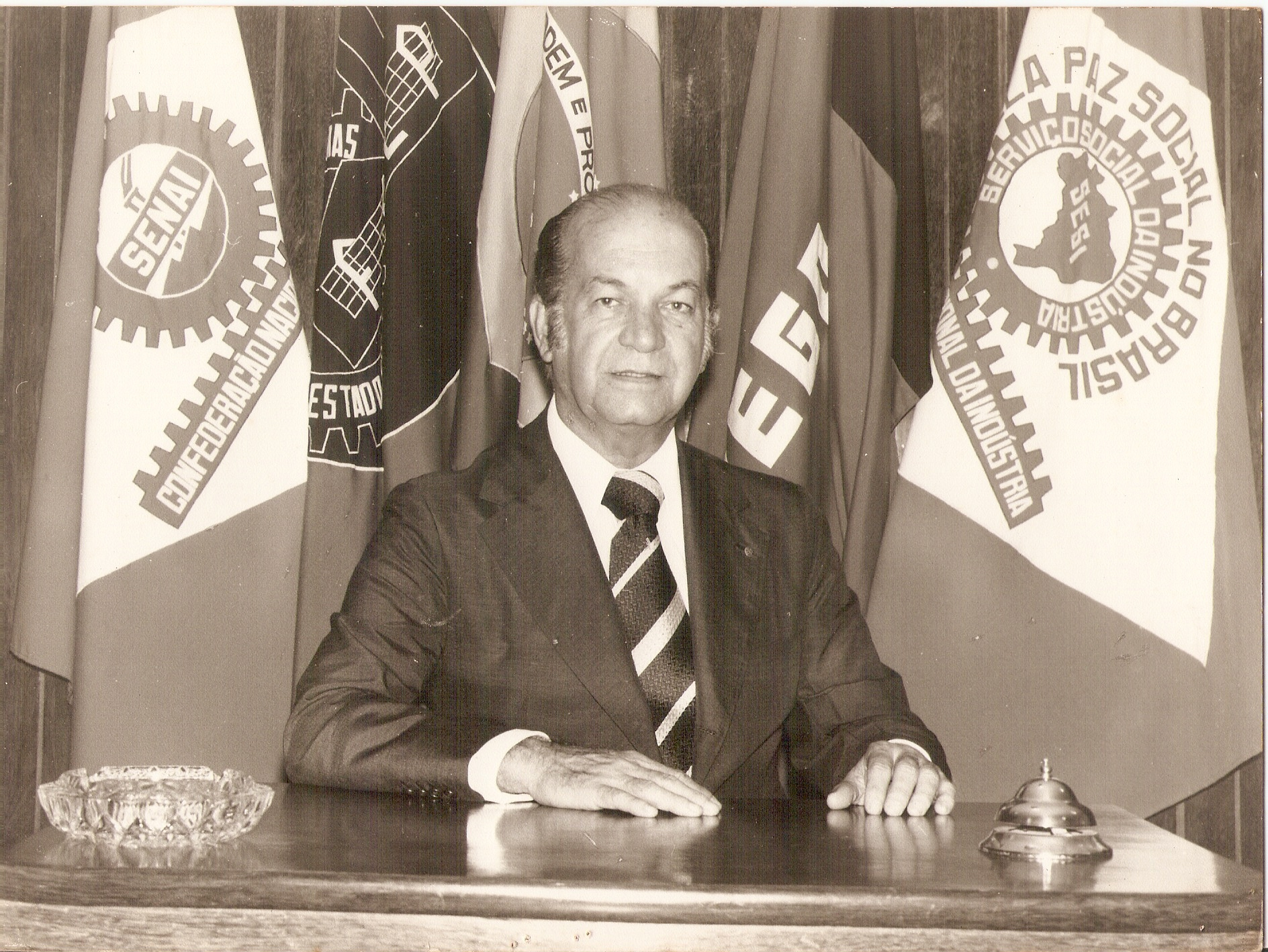 A Velloso